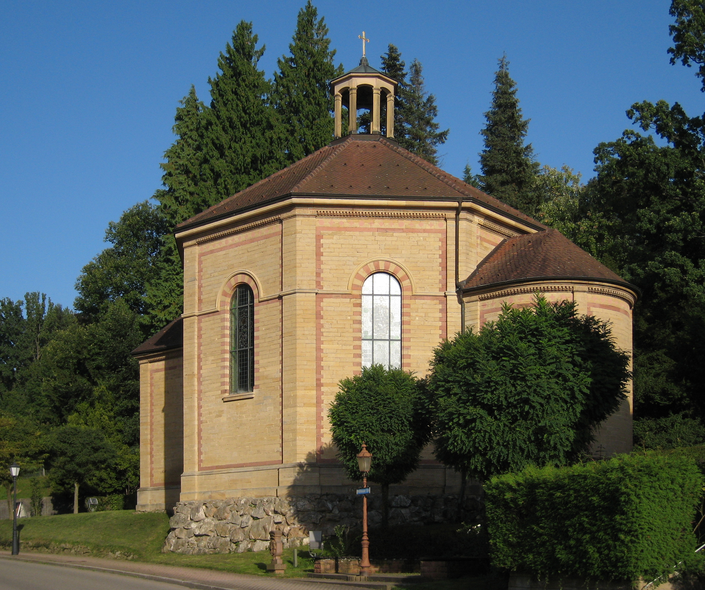 Marienkapelle in Badenweiler. Badenweiler/Süd-Schwarzwald/Deutschland